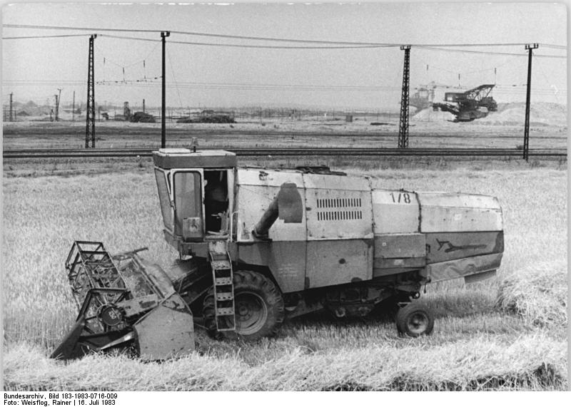 LPG Großräschen, Roggenernte auf Rekultivierung ADN-ZB Weisflog 16.7.83 Cottbus: Roggenernte- Vor einem Jahr erst rekultiviert wurde dieser Boden (ehemals Tagebau) , von dem die Genossenschaftsbauern der LPG "Vereinte Kraft" Großräschen seit dem 15.7. Roggen ernten. Diese Getreideart hat mit 1180 ha innerhalb der Gesamtanbaufläche für Getreide (2100 ha) dieser LPG einen hohen Stellenwert.